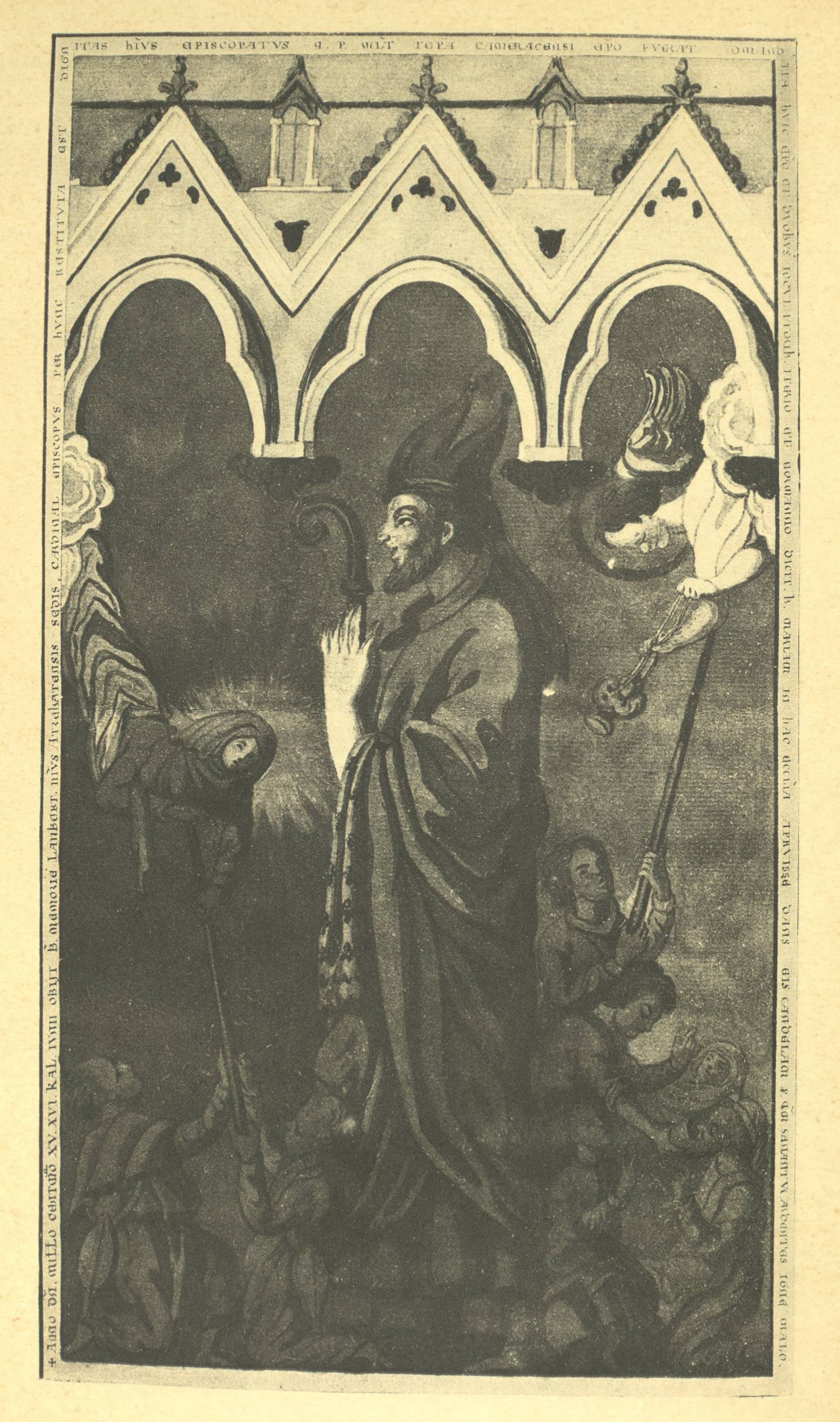 Image de Lambert de Maastricht